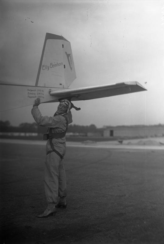 Der Hindenburgpokal für die bekannte deutsche Fliegerin Elly Beinhorn! Die bekannte deutsche Fliegerin Elly Beinhorn, erhielt den Hindenburgpokal zur Förderung sportlicher Leistungen mit leichten Motorflugzeugen in Anerkennung ihrer Leistungen.